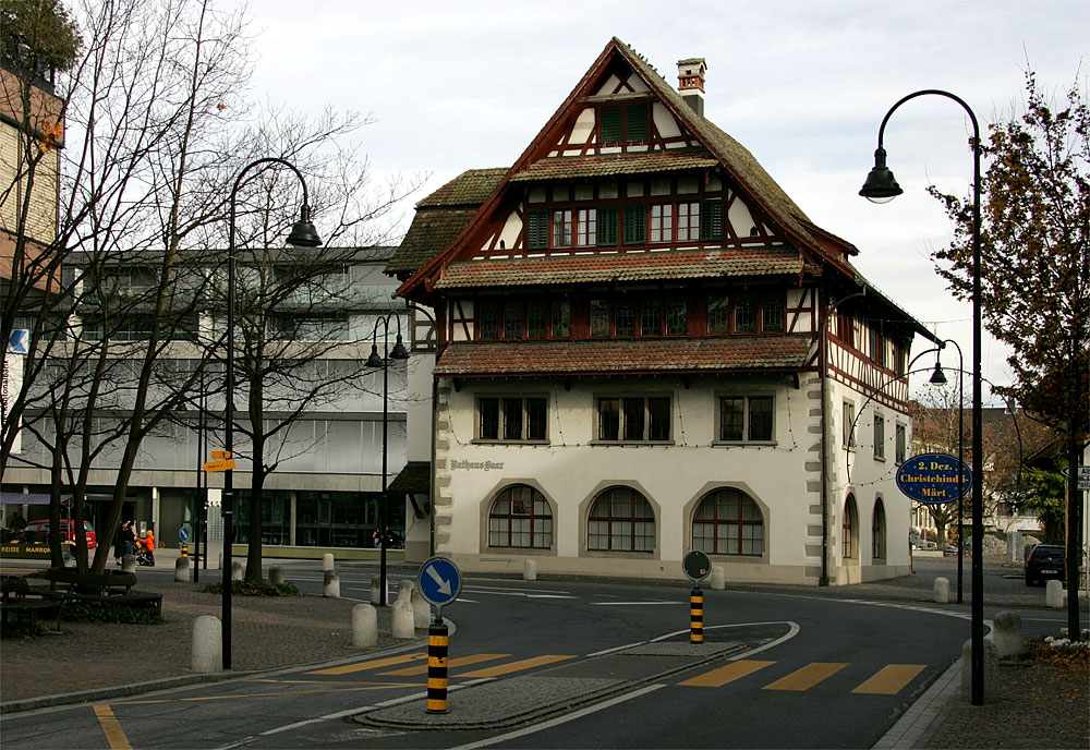 Das Rathaus von Baar